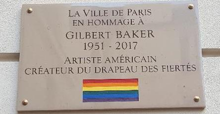 Plaque officielle commémorative de la Ville de Paris située sur la place des Emeutes de Stonewall dans le quartier du Marais